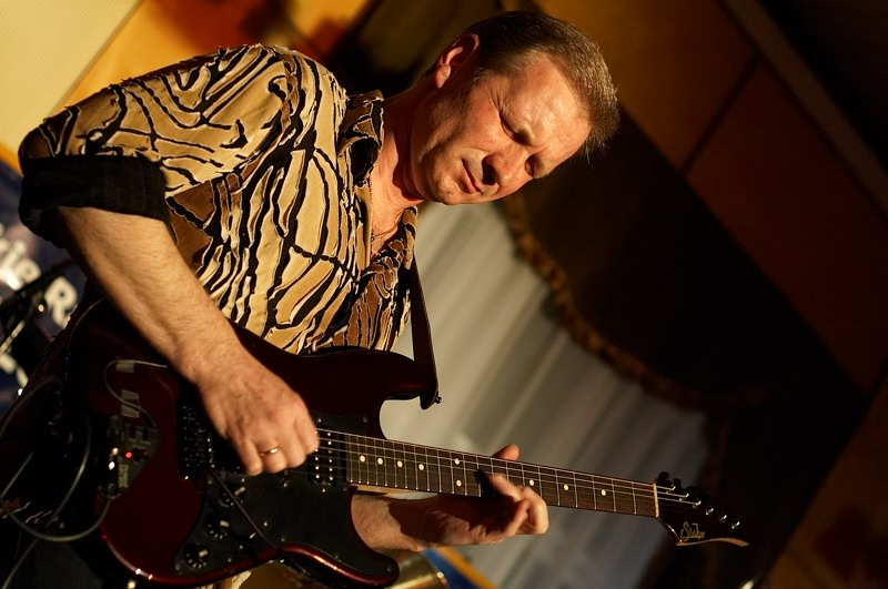 Marek Raduli - koncert w studiu Radia Rzeszów (marzec 2007)